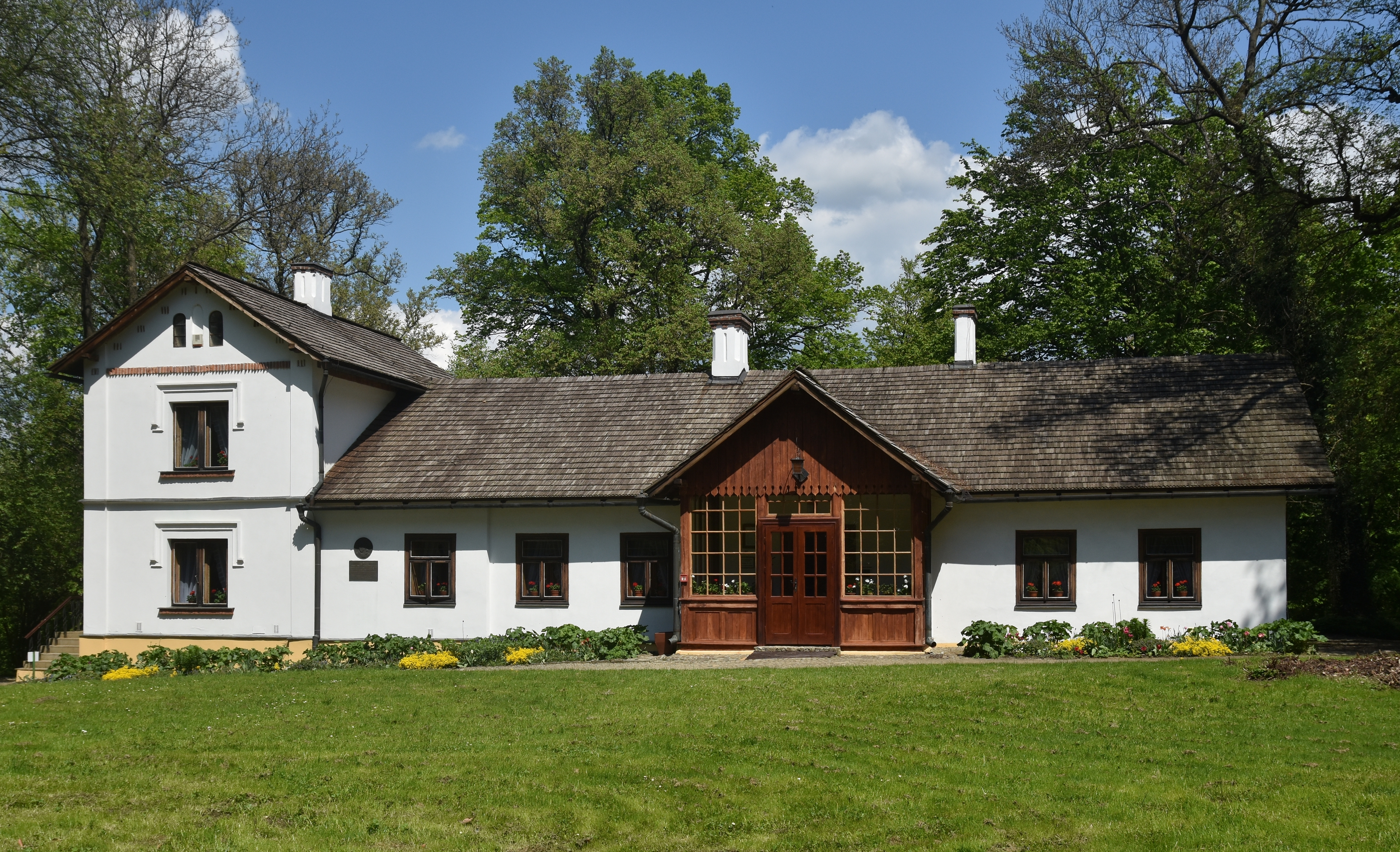 Żarnowiec, Muzeum Marii Konopnickiej w Żarnowcu